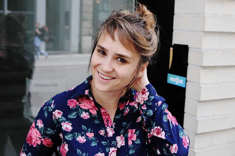 Porträt von Stefan Klüter im Sommer 2017